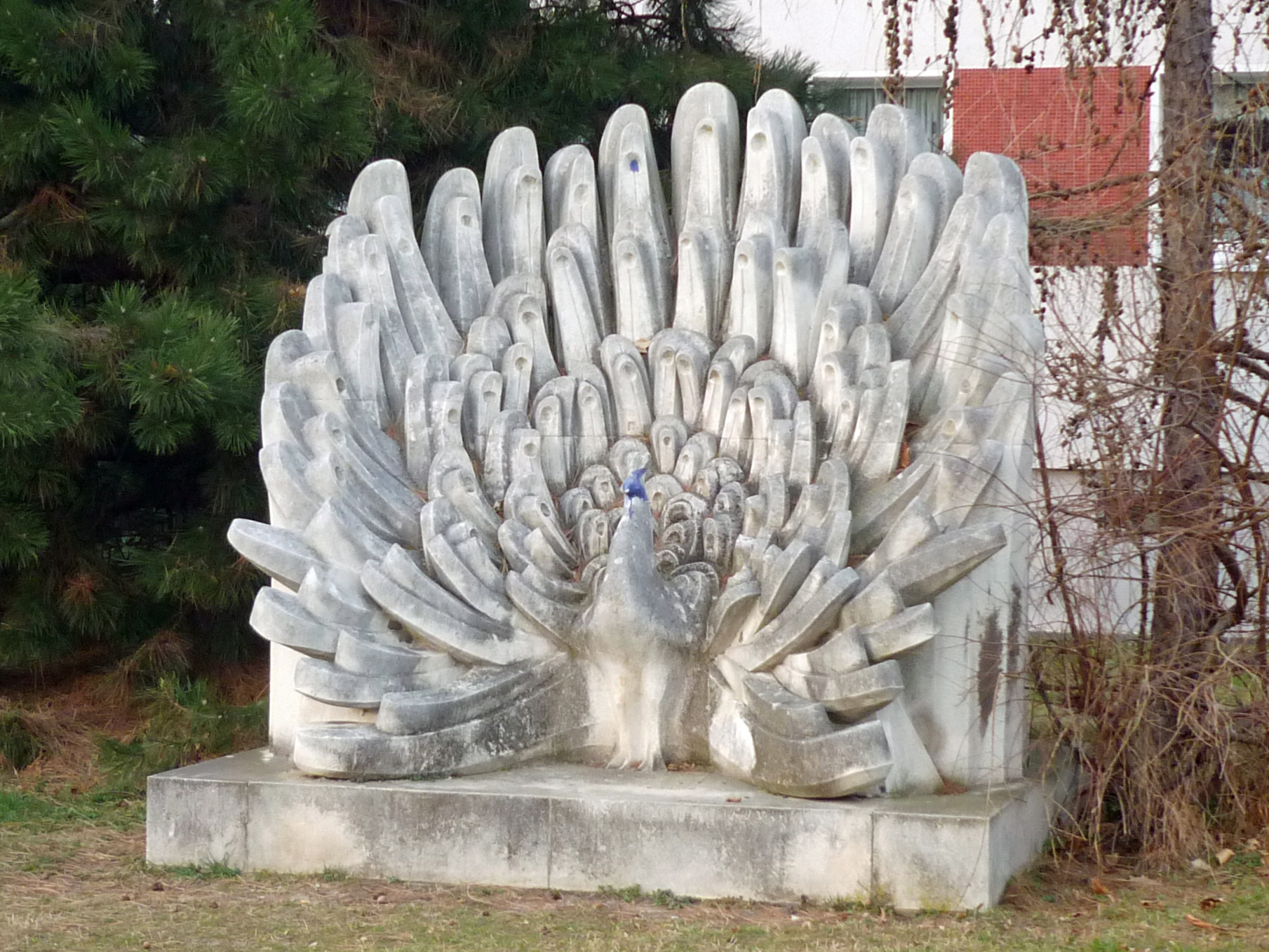 Skulptur „Radschlagender Pfau“ von Susanne Voigt an der Stübelalle in Dresden-Johannstadt